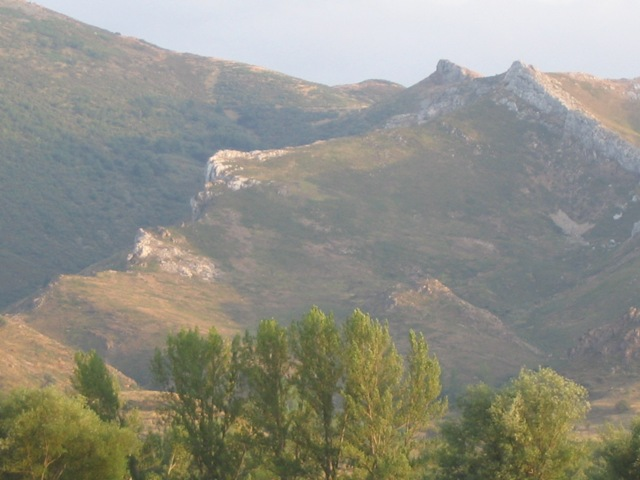 Macizo de Las Coladillas